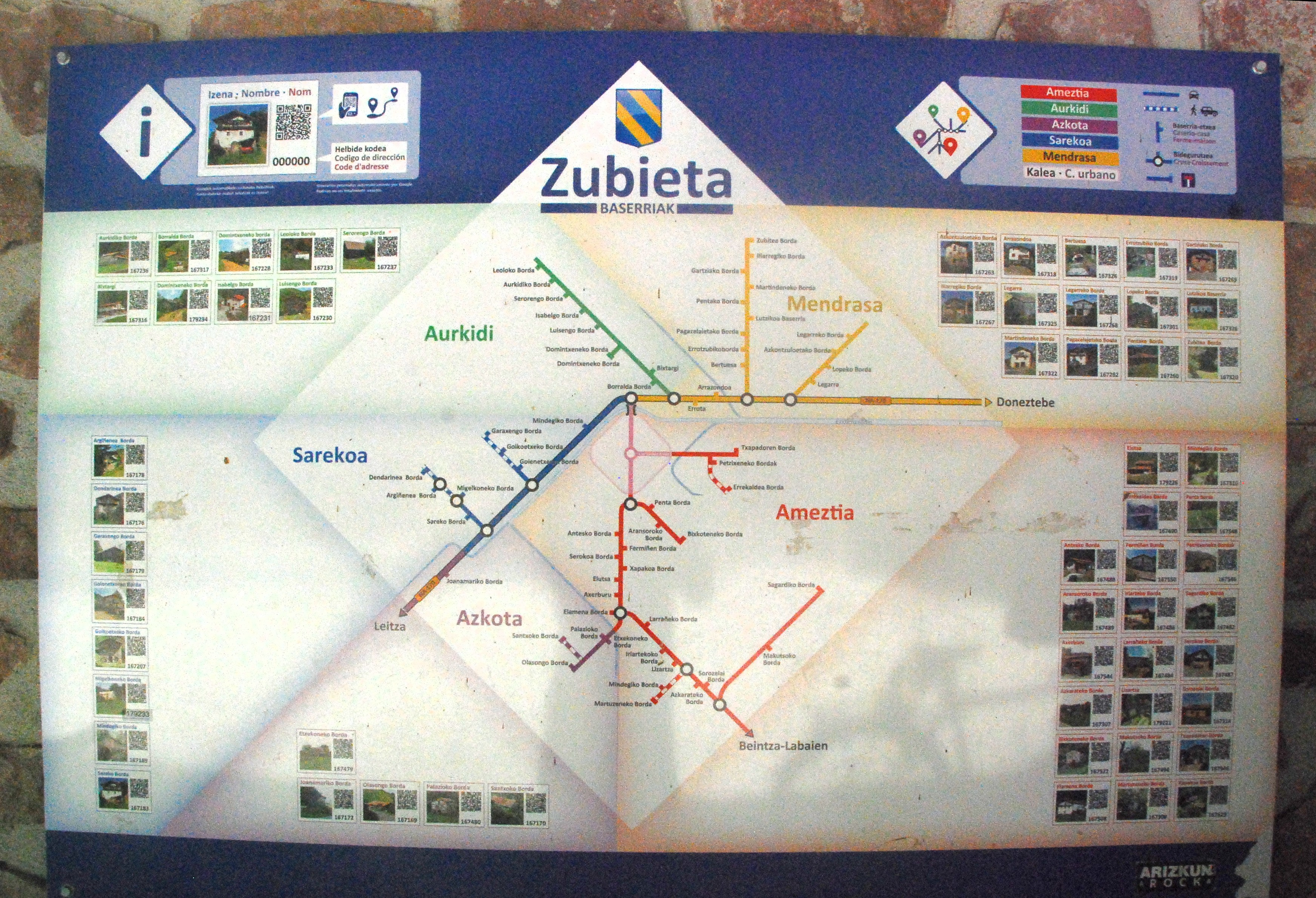 Zubietako baserrietara heltzeko bideak. Metro-mapa itxurarekin. Zubietako udalak autobus geltokian jarri duena (domeinu publikoan).